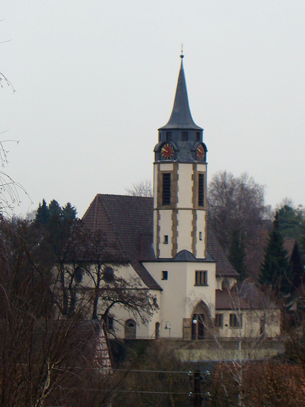 Georgskirche in Massenbach, Ansicht von Westen